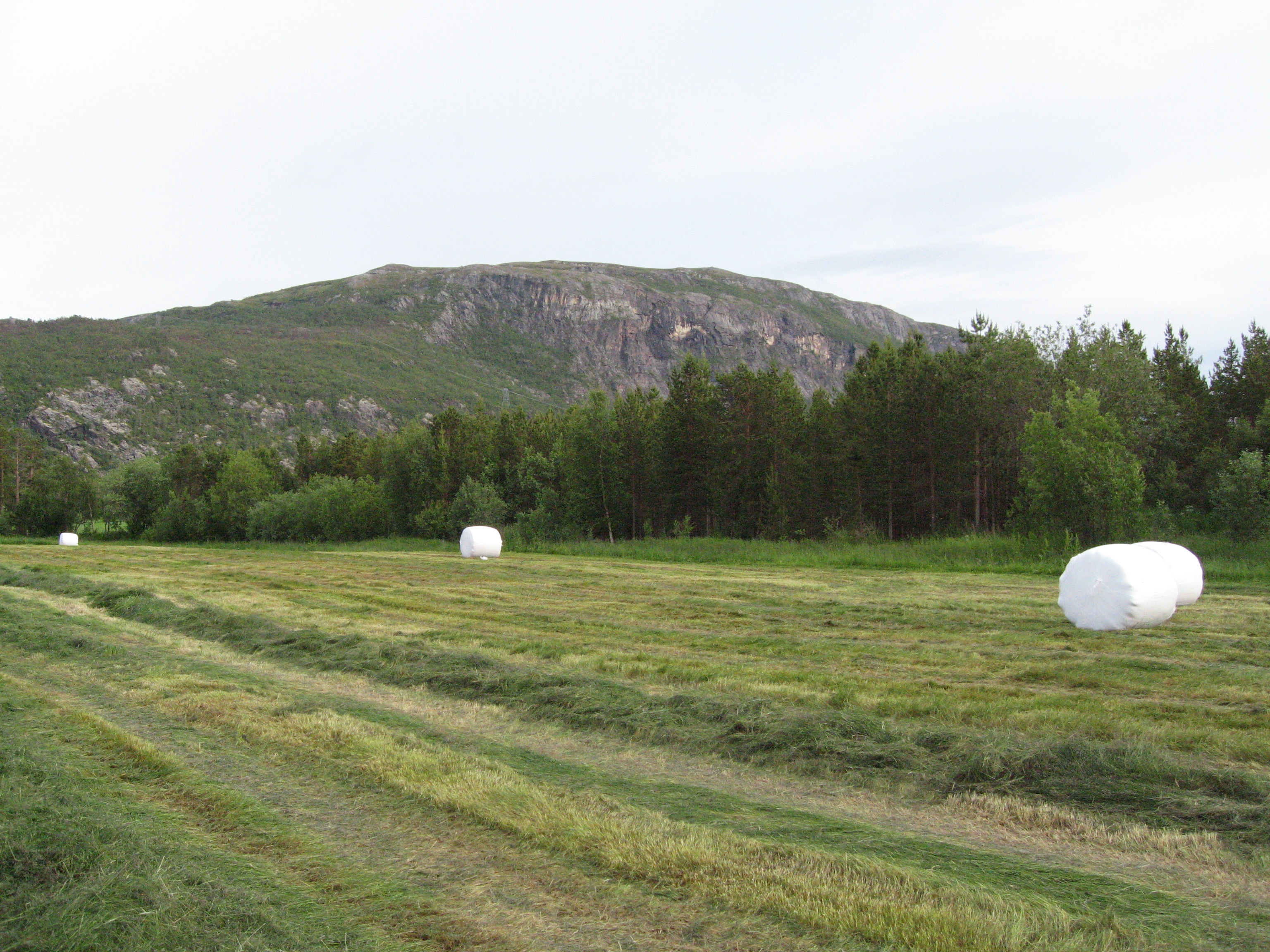 Rundballar på Heimdal gard, Øvre Alta, Alta